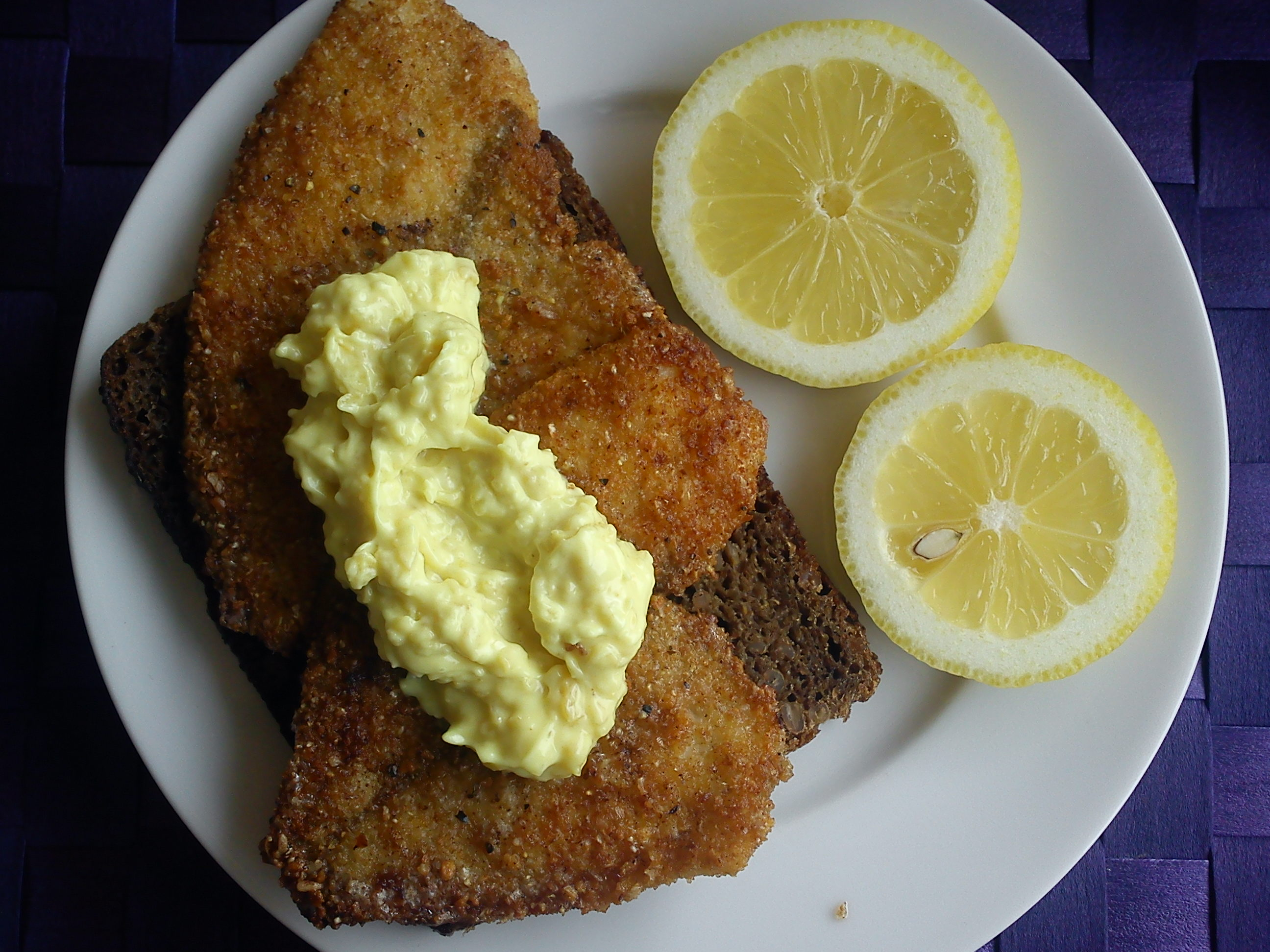 Rugbrød med fiskefileter og remoulade